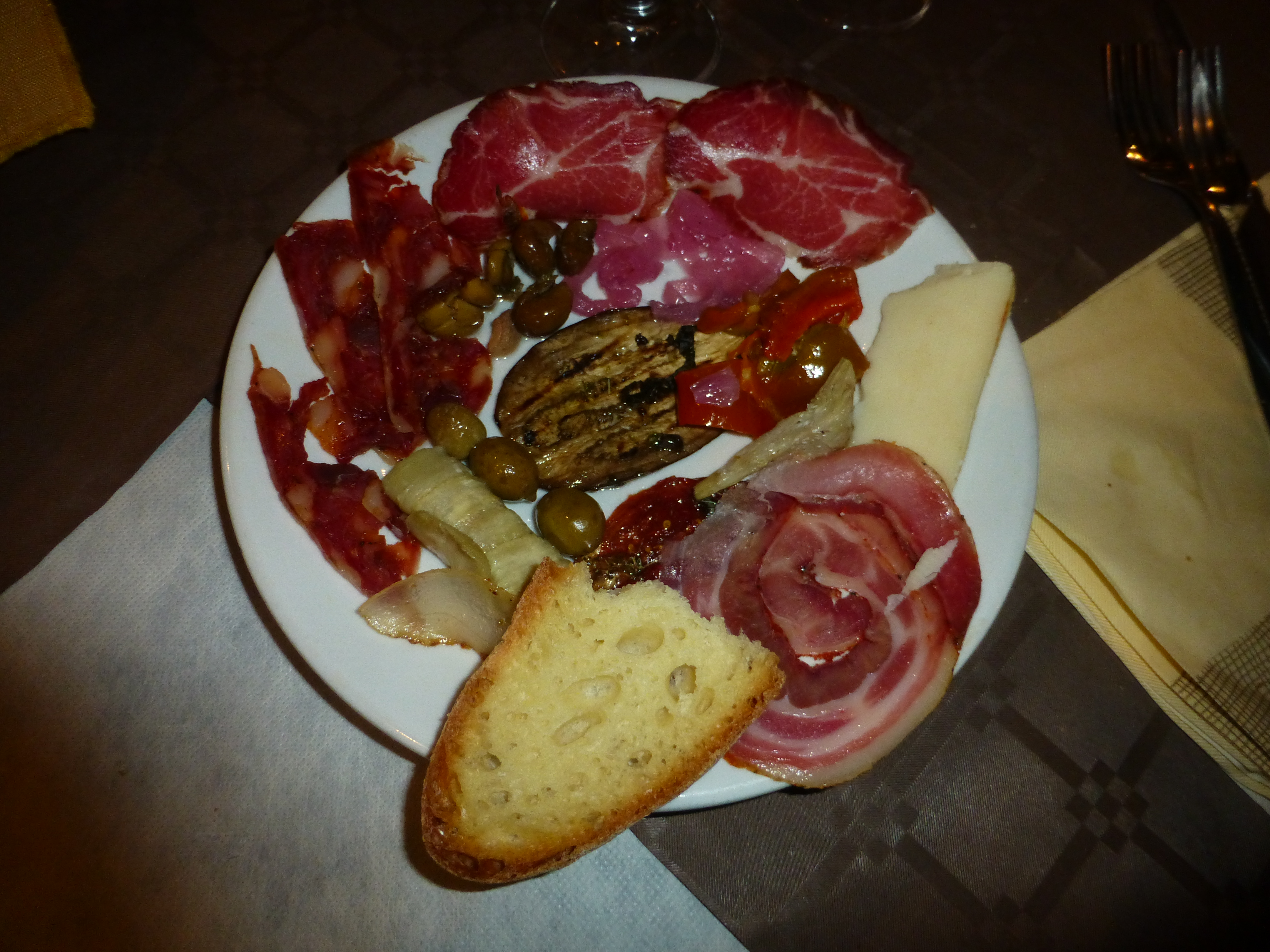 Antipasti di affettati olive e formaggi in Calabria e nella vallata dello Stilaro